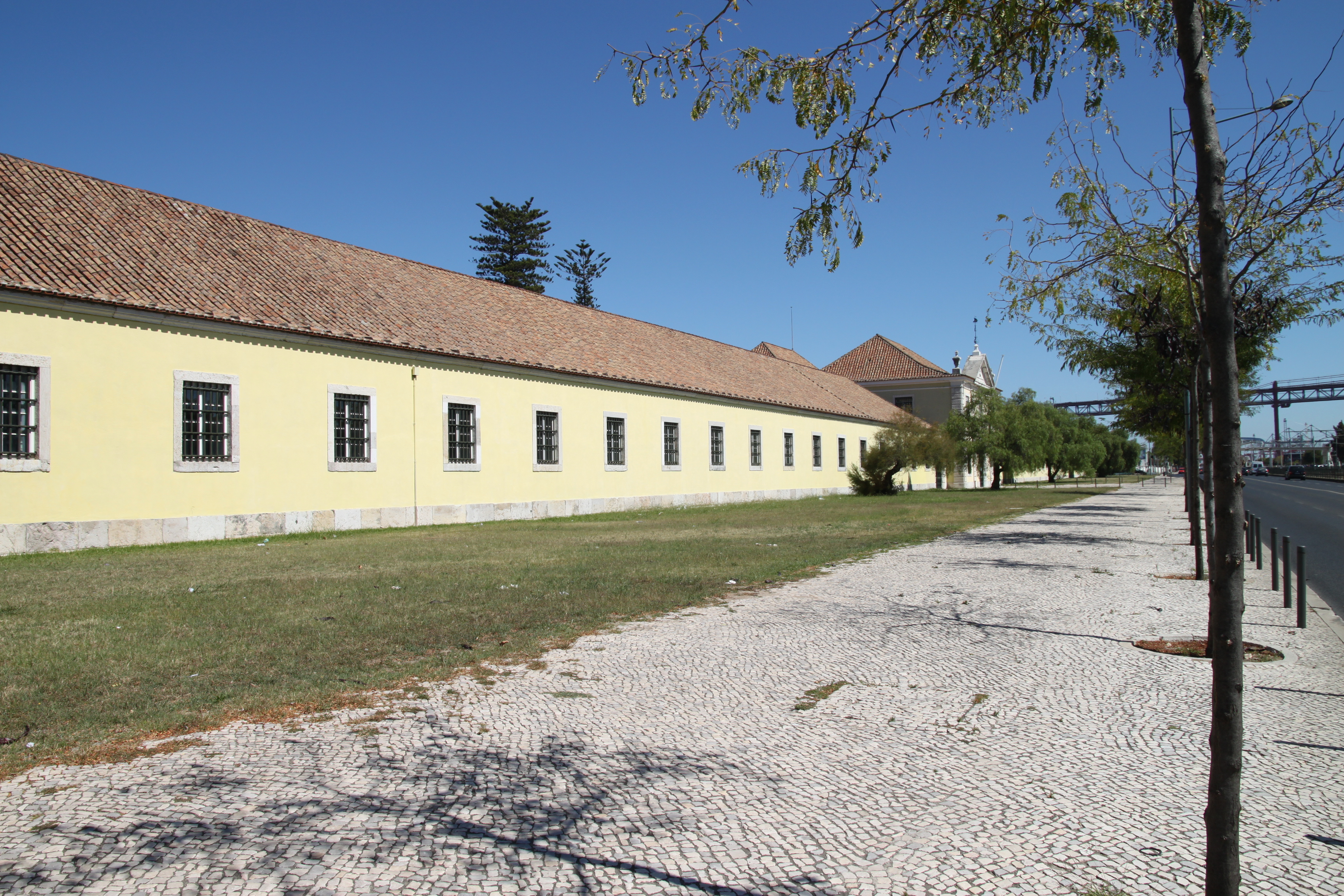 Fábrica Nacional da Cordoaria ou Cordoaria Nacional This file was uploaded for Wiki Loves Monuments in Portugal with the unique identifier 70634.